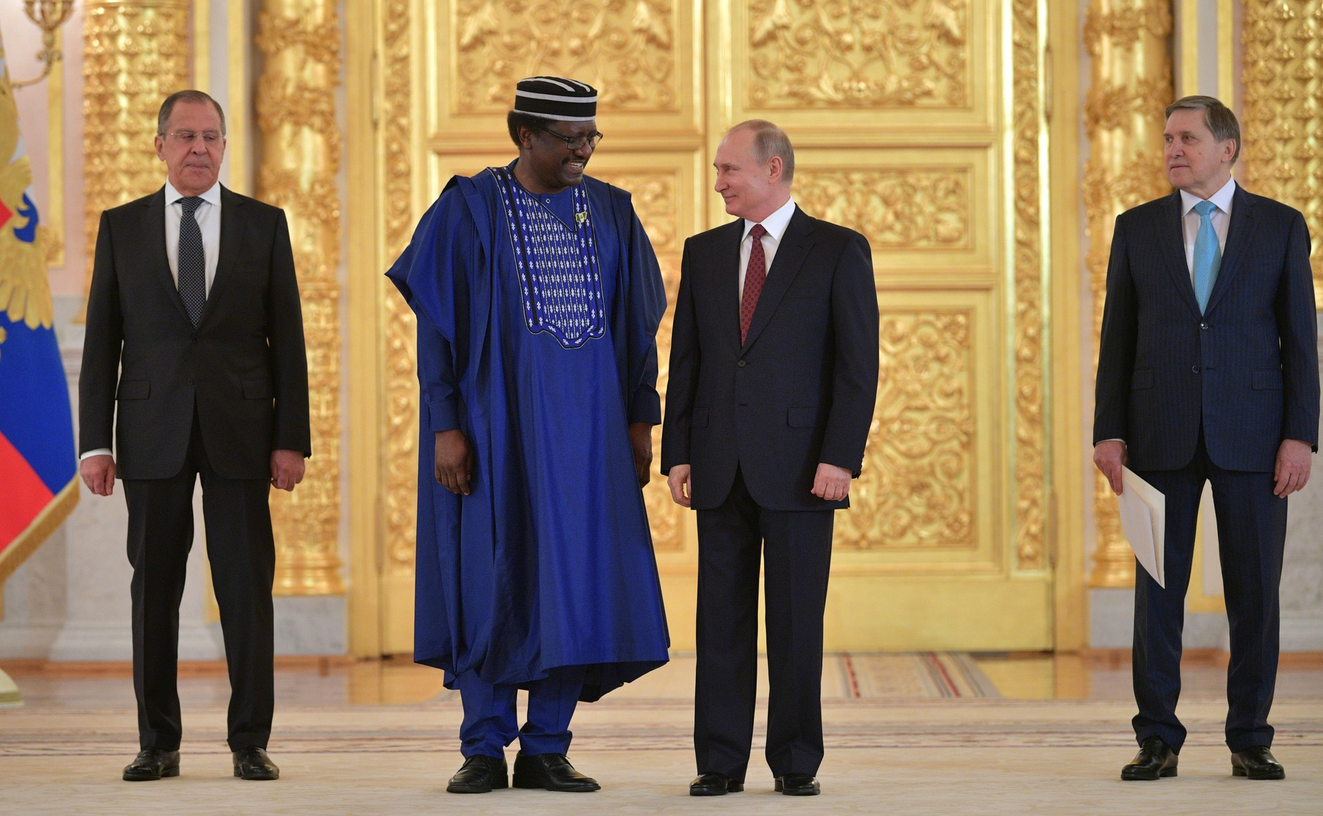 В Александровском зале Большого Кремлёвского дворца Владимир Путин принял верительные грамоты у послов ряда иностранных государств. На церемонии вручения верительных грамот. С Чрезвычайным и Полномочным Послом Федеративной Республики Нигерии в Российской Федерации Стивом Дэвисом Угбой.